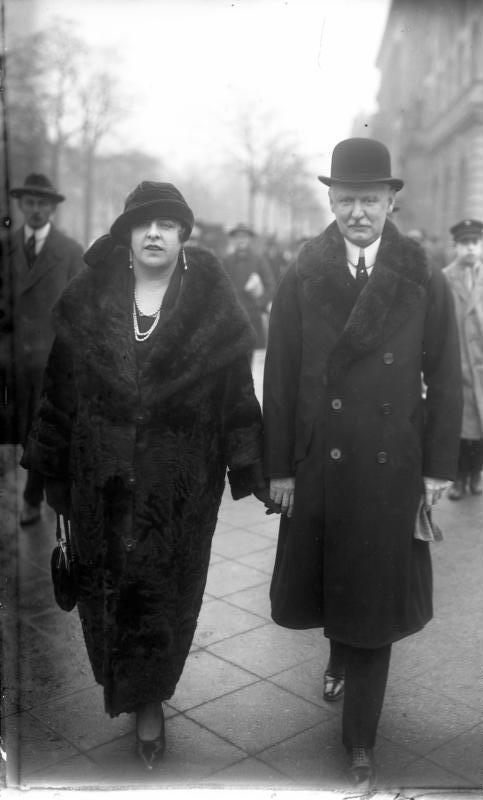 Louis Adlon der Besitzer des von seinem Vater gegründeten Hotels Adlon Unter den Linden in Berlin mit seiner Gattin Frau Adlon. Lebt heute in der Ostzone bei Potsdam.